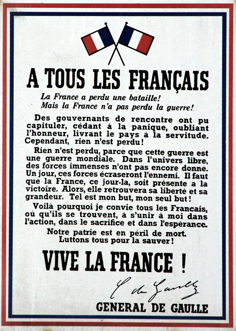 Texte de l'Appel du 18 juin 1940 de Gaulle à tous les français dans une rue de Paris